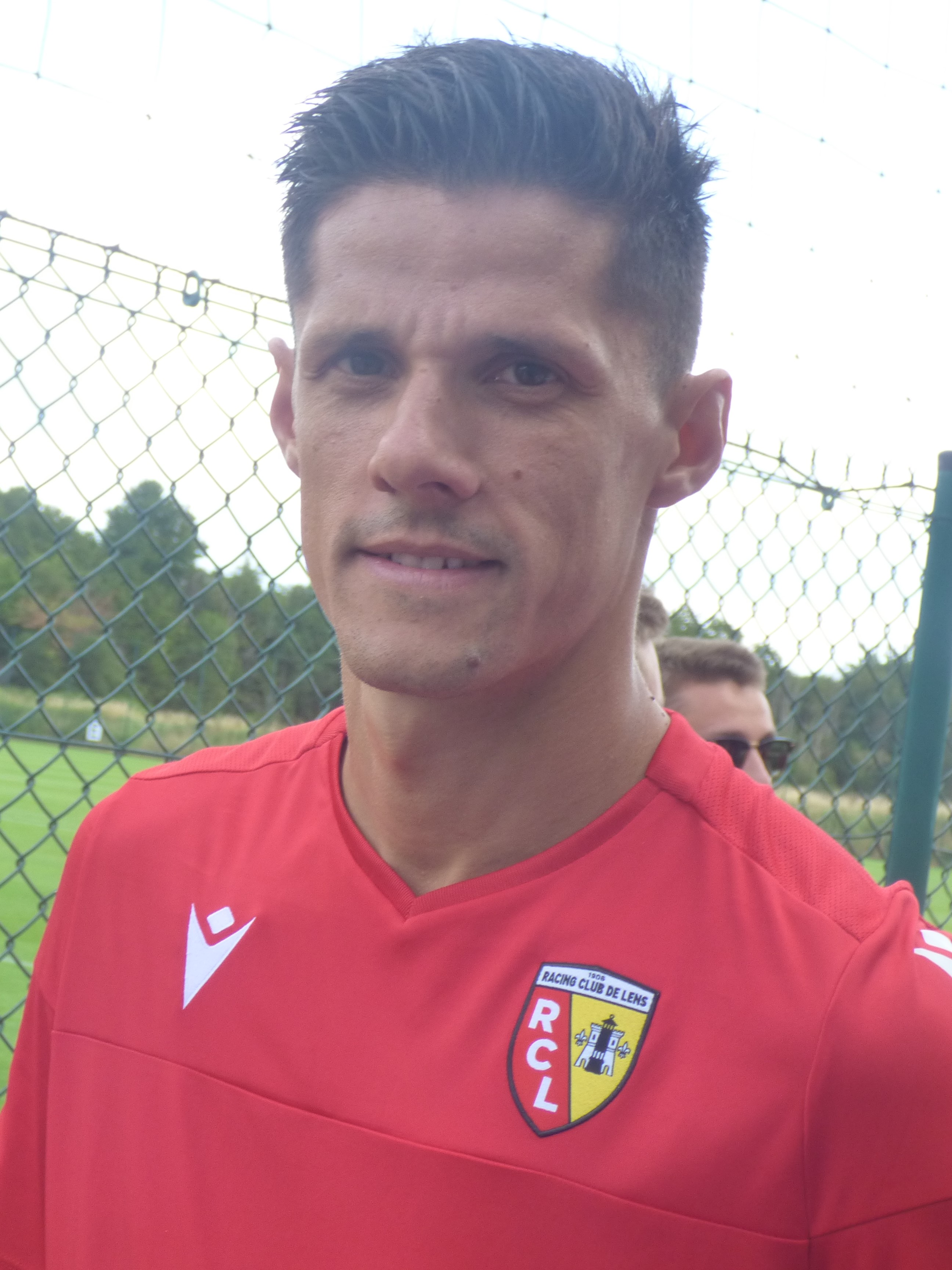 Florian Sotoca lors de l'entraînement public du Racing Club de Lens, au centre technique et sportif de La Gaillette le 2 juillet 2019.